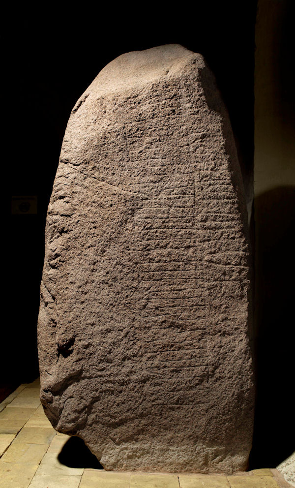 Foto af Roberto Fortuna